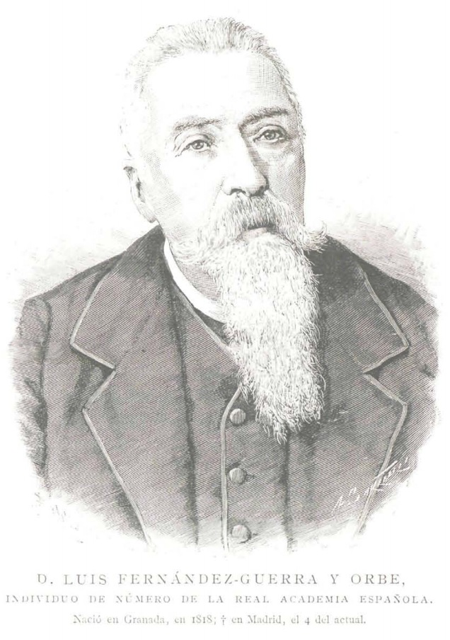 D. Luis Fernández-Guerra y Orbe, individuo de número de la Real Academia Española.